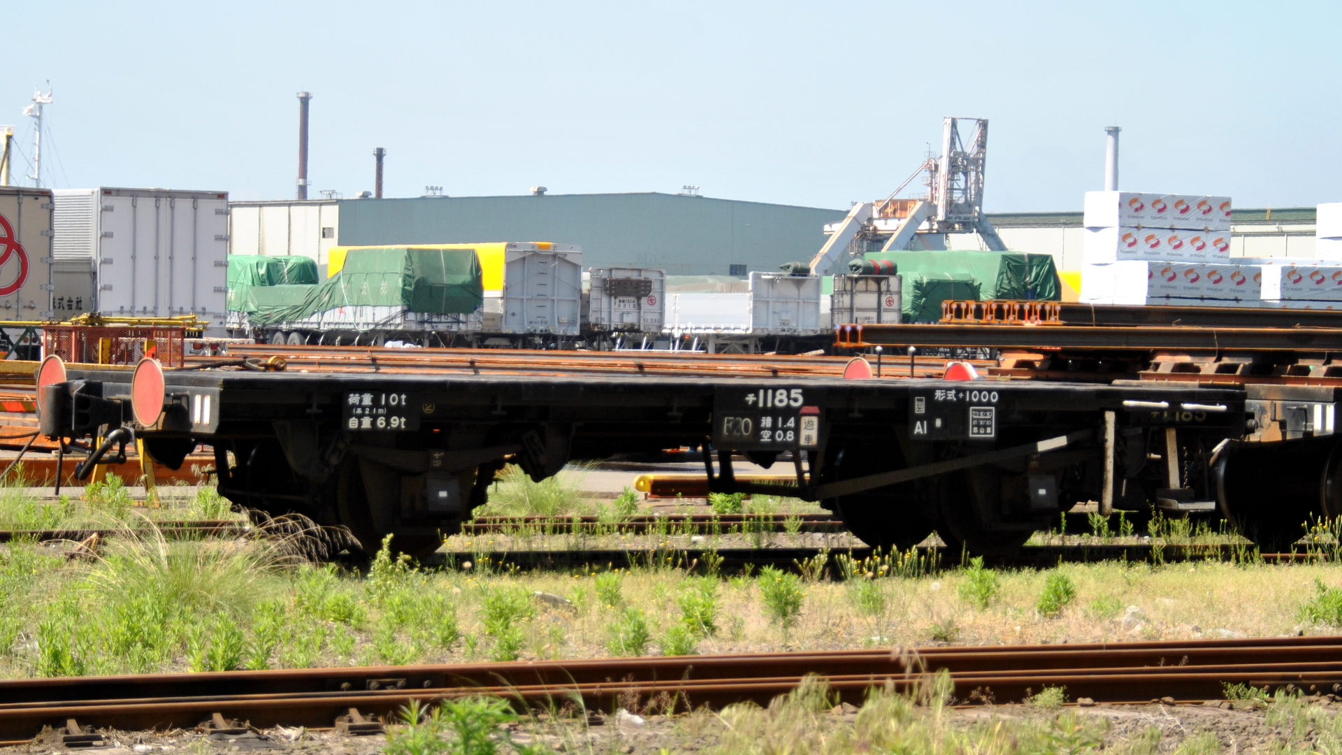 チ1000形（1185）